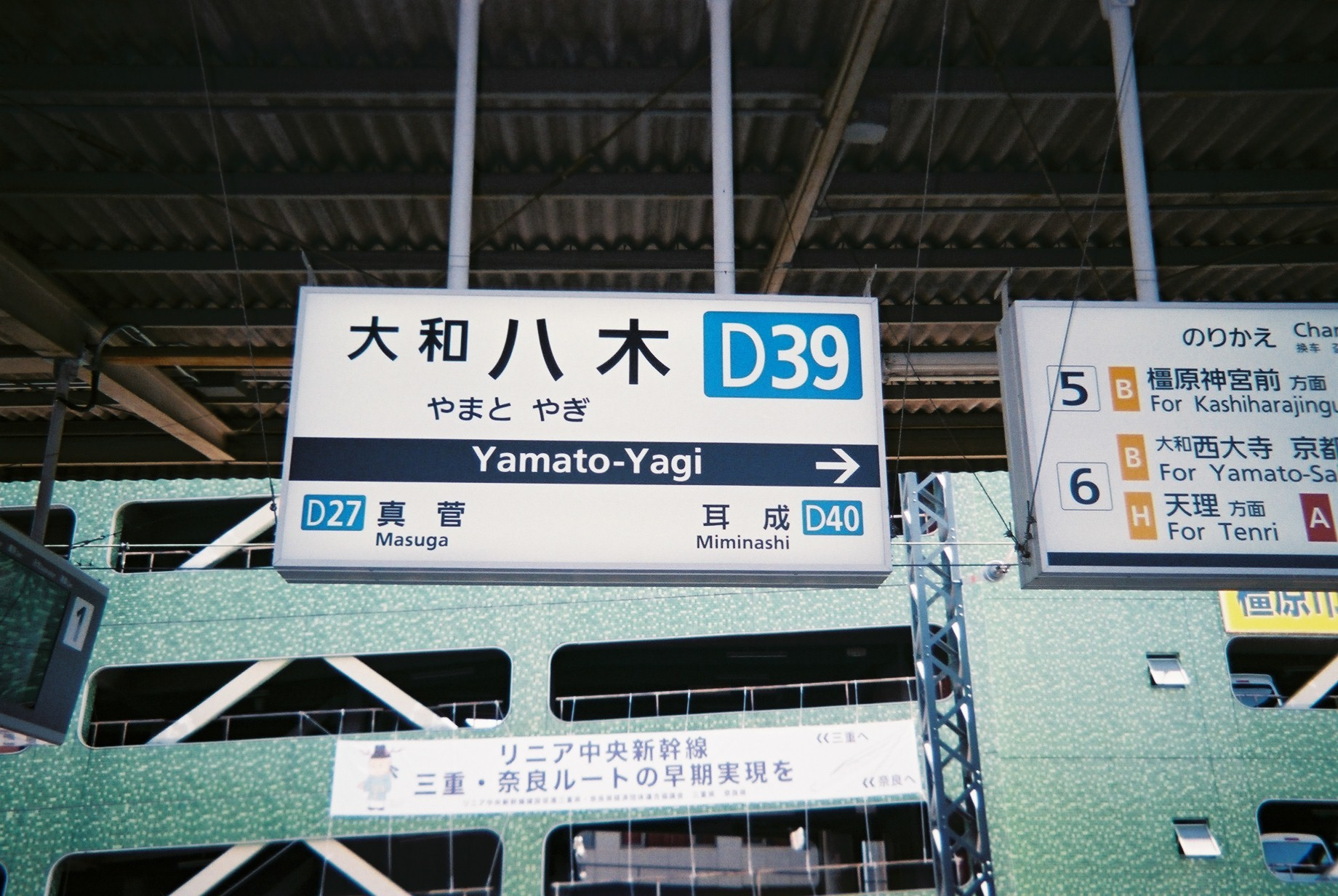 近鉄大和八木駅名標